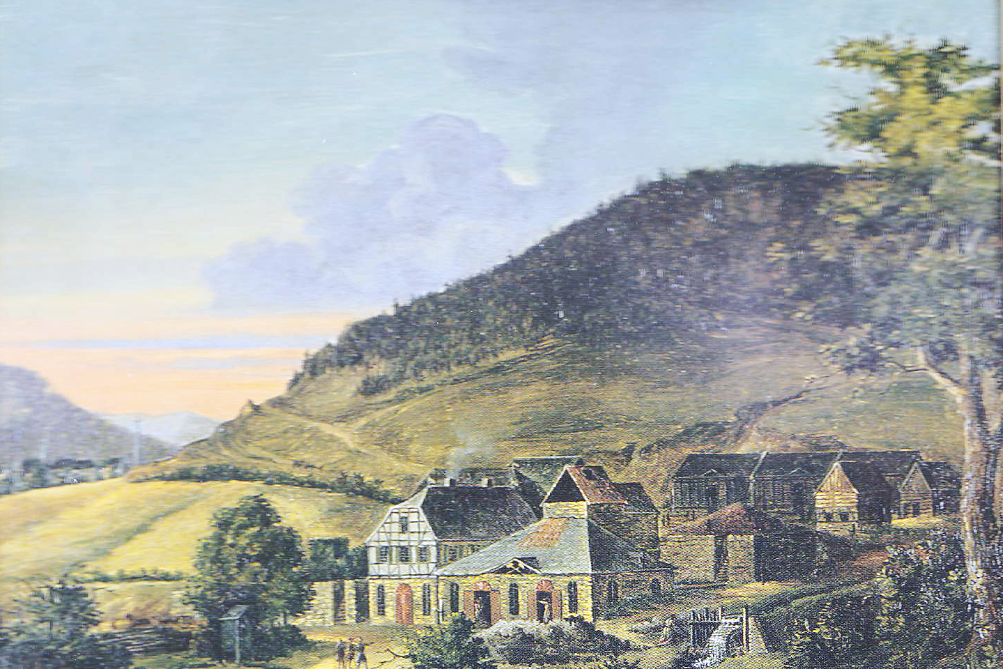 Die Olsberger Hütte nach einem Gemälde von Engelbert Seibertz 1832